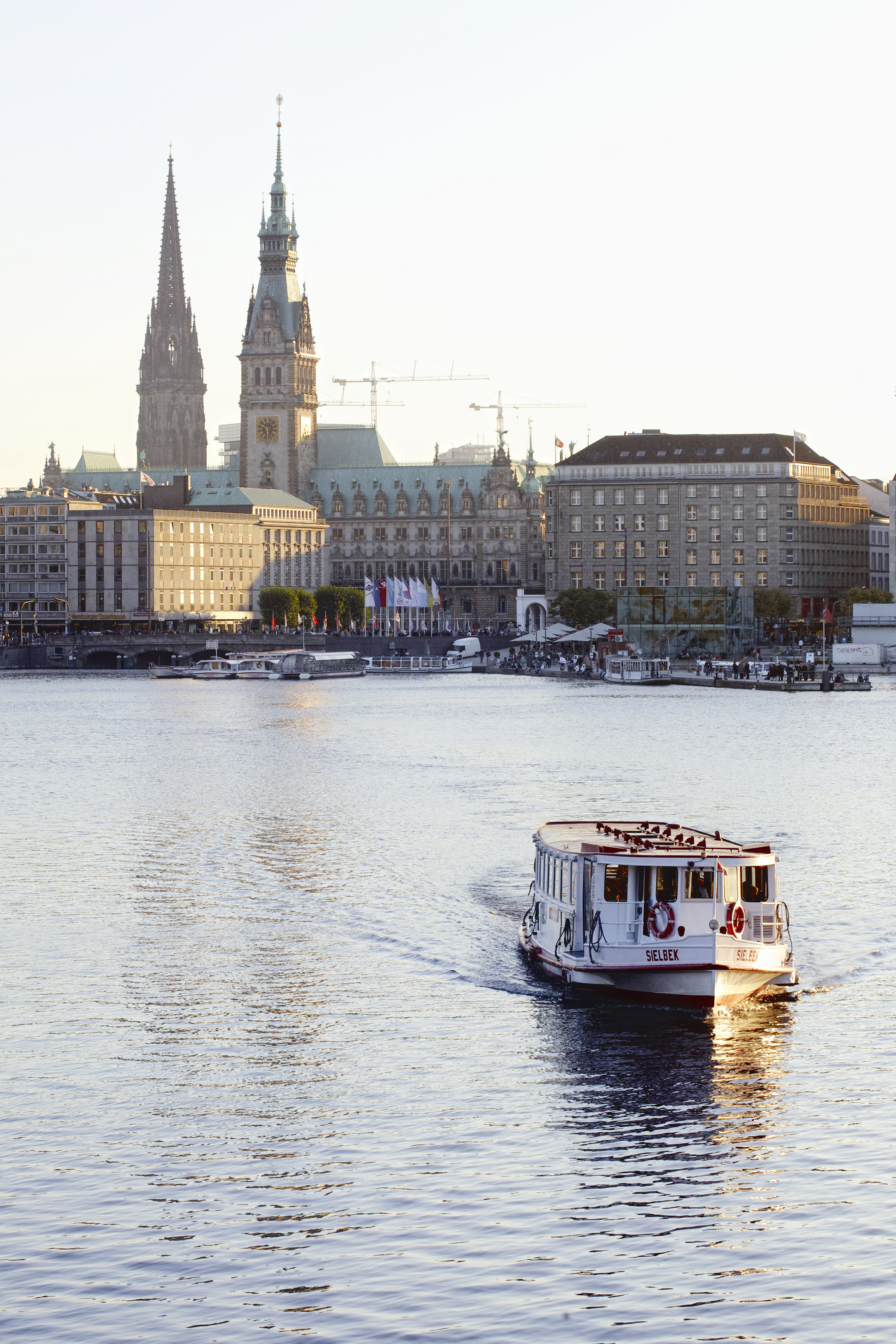 Freie und Hansestadt Hamburg, Deutschland/Germany Alster Aufgenommen am 10. Oktober 2010 - Feel free to use this image on any media (except for illegal content), but please tell me where you have used it (e.g. Link). - Fühlt euch frei das Foto zu verwenden (außer bei illegalen Inhalten), aber seit so nett und teilt mir mit wo ihr es benutzt habt (z.B. Link). Thomas Ulrich, Hamburg, Germany 2010